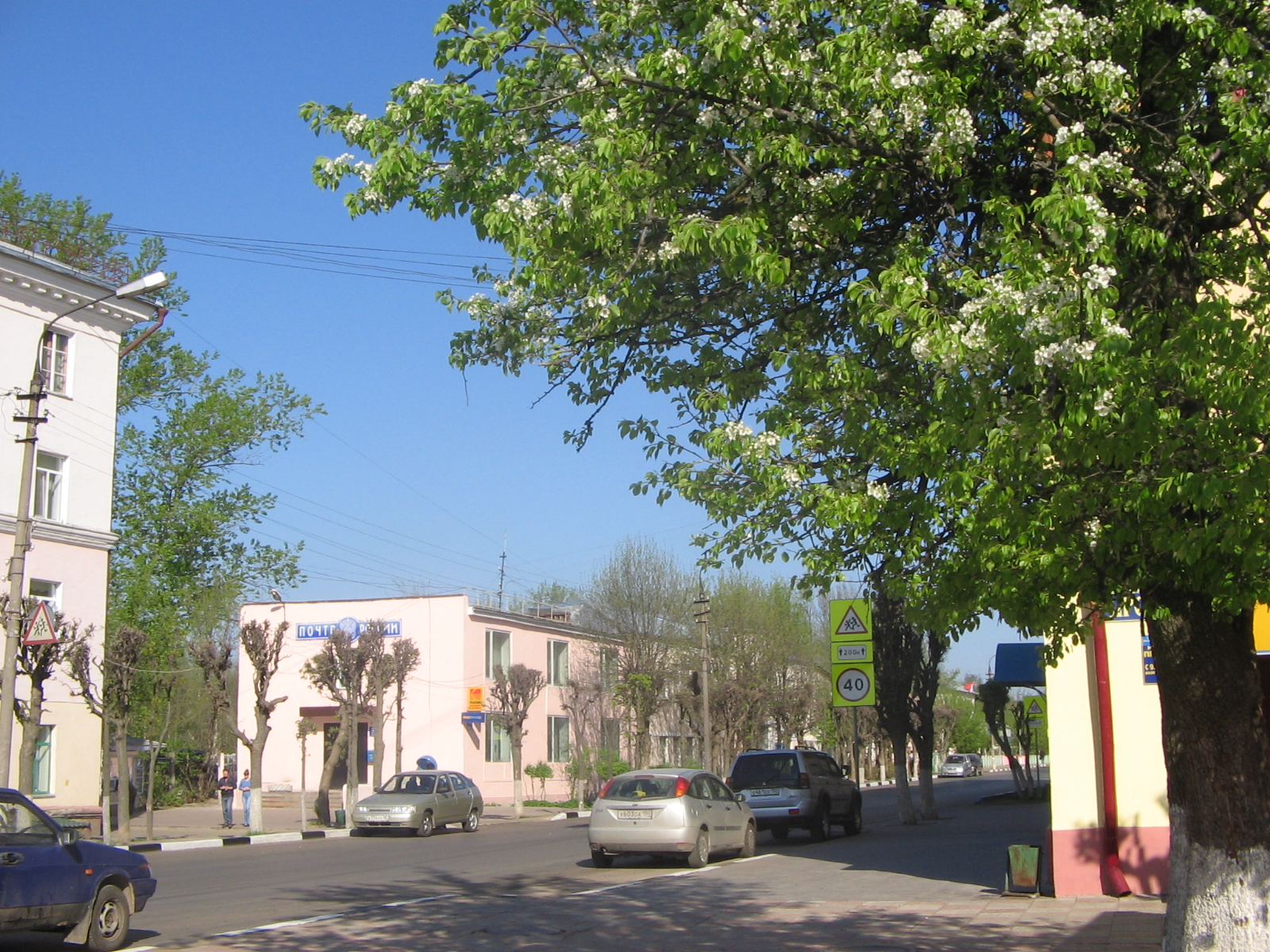 Солнечногорск (ул. Почтовая)